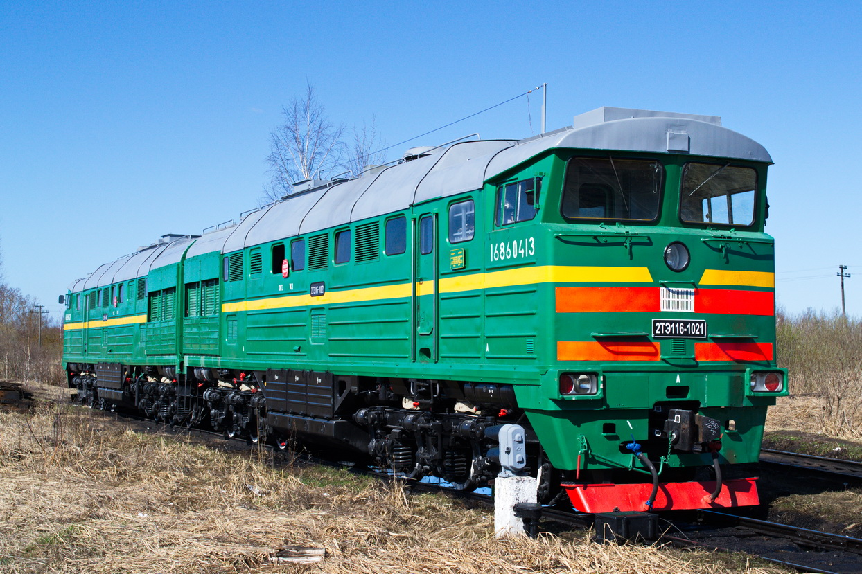 КР 10.2003 г. КР Даугавпилсский ТРЗ 02.2013 г.